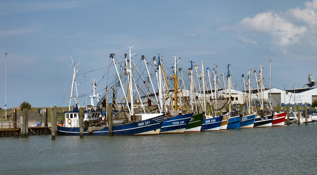 Fischerboote in Norden/Norddeich (Ostfriesland)